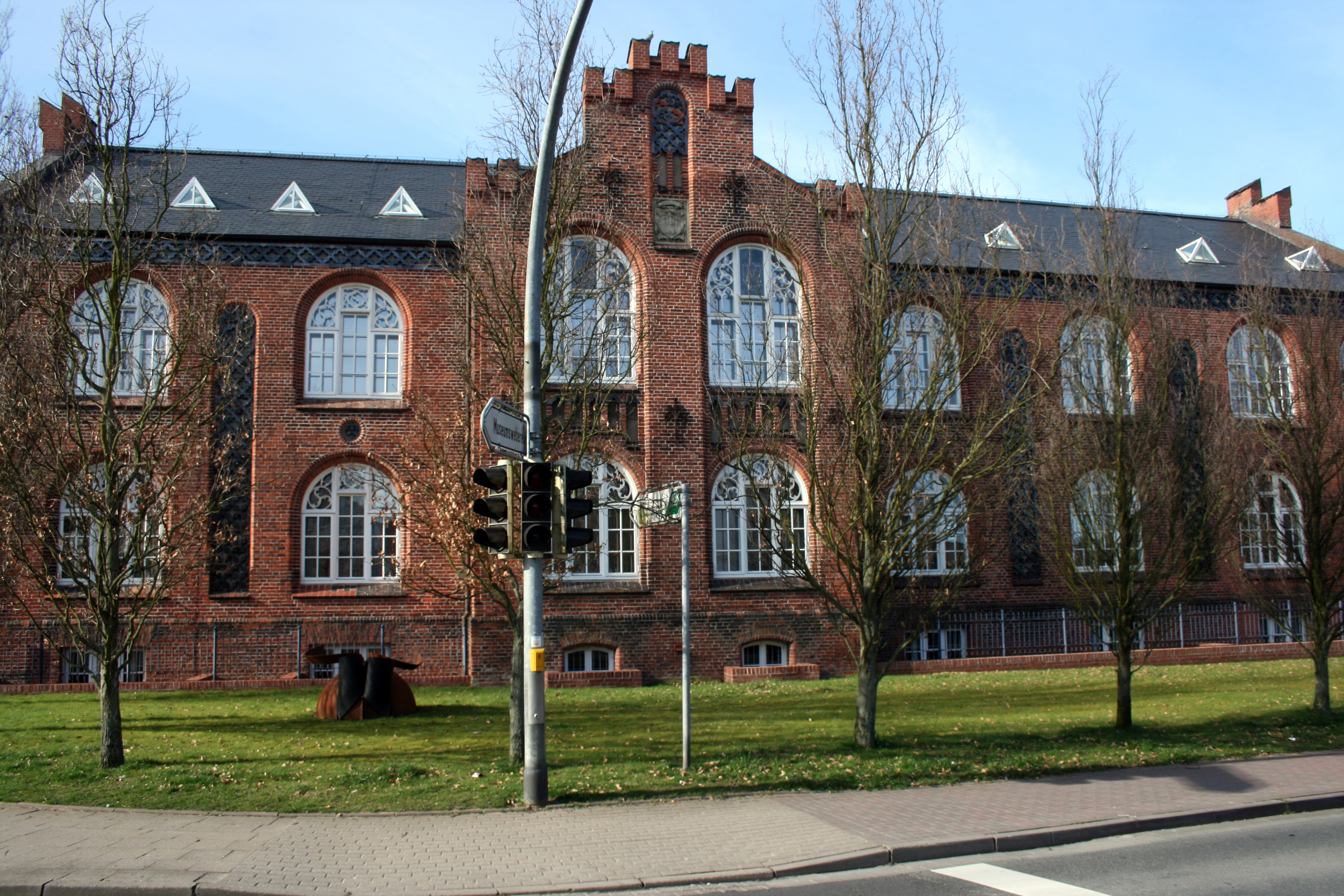 ehemalige Gelehrtenschule (bis 1962) vom Schulhof aus gesehen. Heute Bestandteil des Dithmarscher Landesmuseums